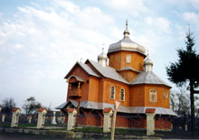 Церква у с. Черниця (Миколаївський деканат). архітектор В. Нагірний (1848—1921)